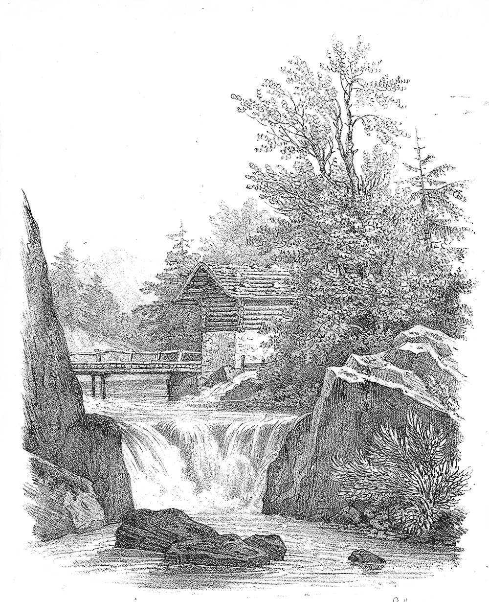 Látkép patakkal